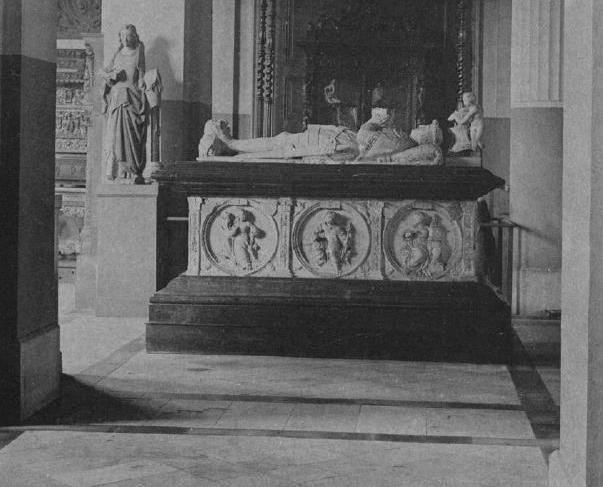 Charles 1er de Lalaing en 1893 au musée de Douai